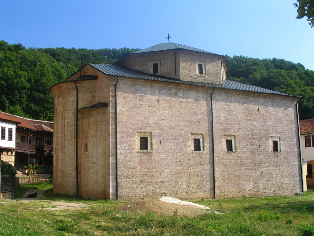 Св. Богородица Пречиста Кичевска Автор: Зорески Љупчо